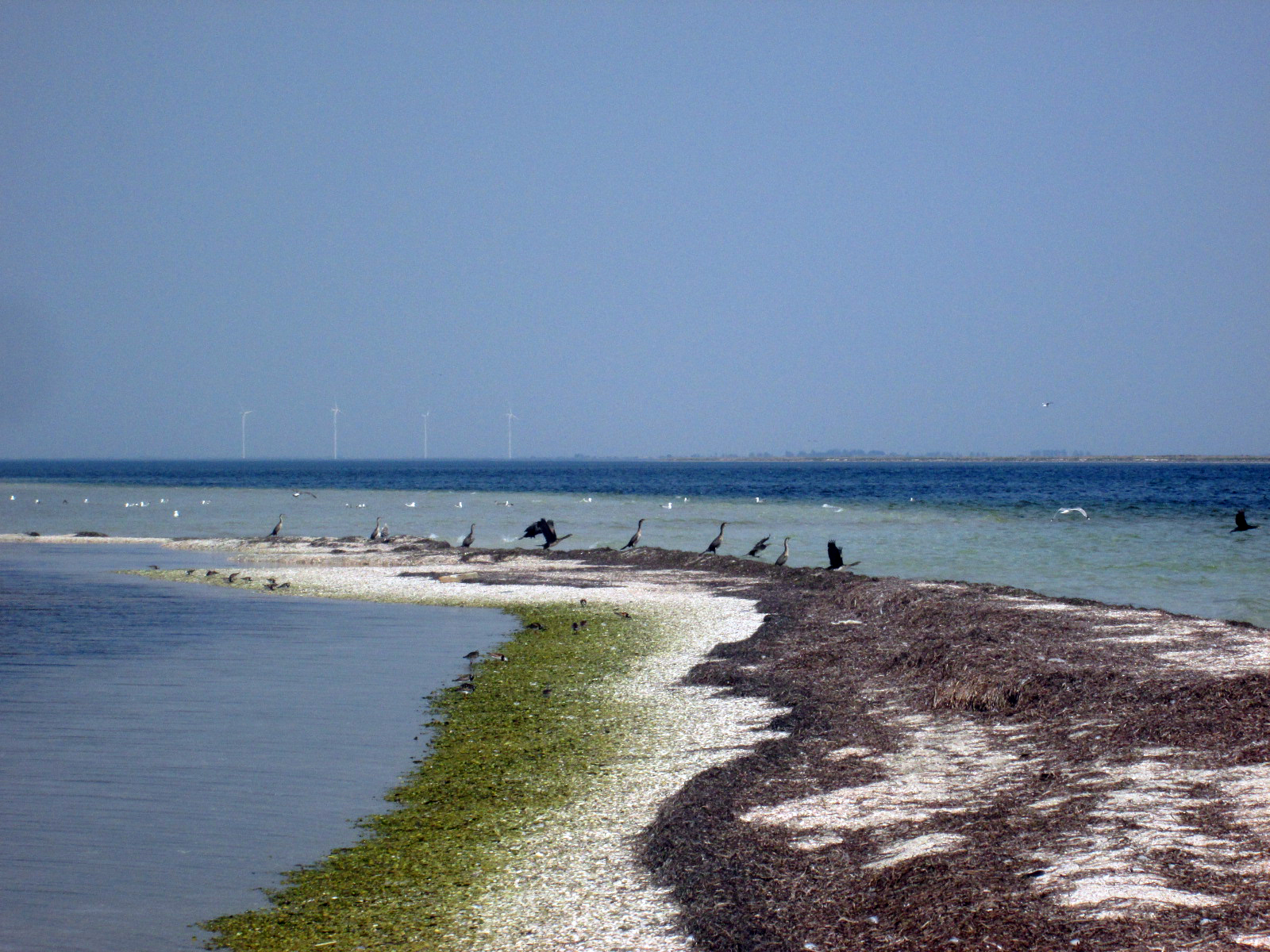 Баклани полюють і відпочивають на узбережжі одного з малих Каланчацьких островів